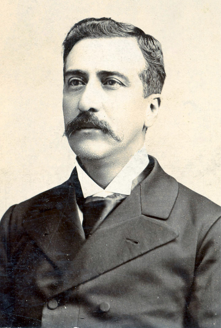 Cano, Fidel. Fotografía de la Colección José Joaquín Herrera.